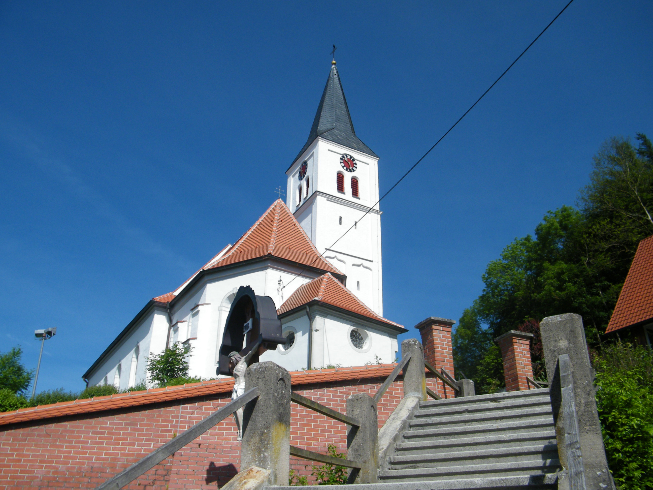 Alte Kirche